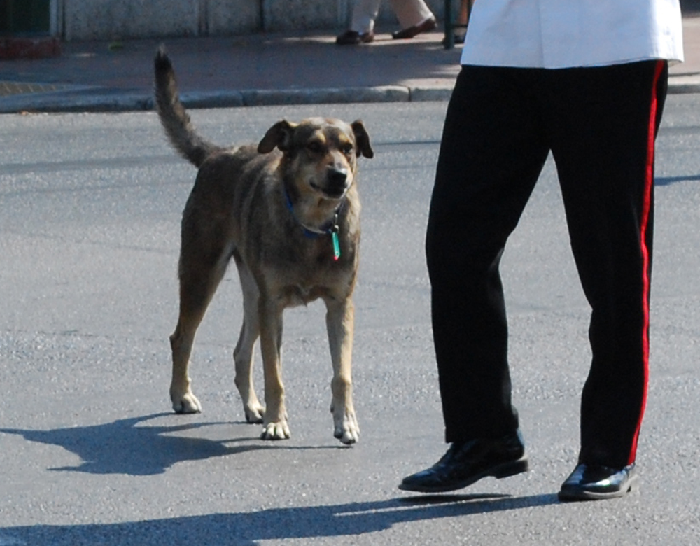 O cão grego Loukanikos durante a troca da guarda do Parlamento, em Atenas, fotografado por Jean Housen em 2009.